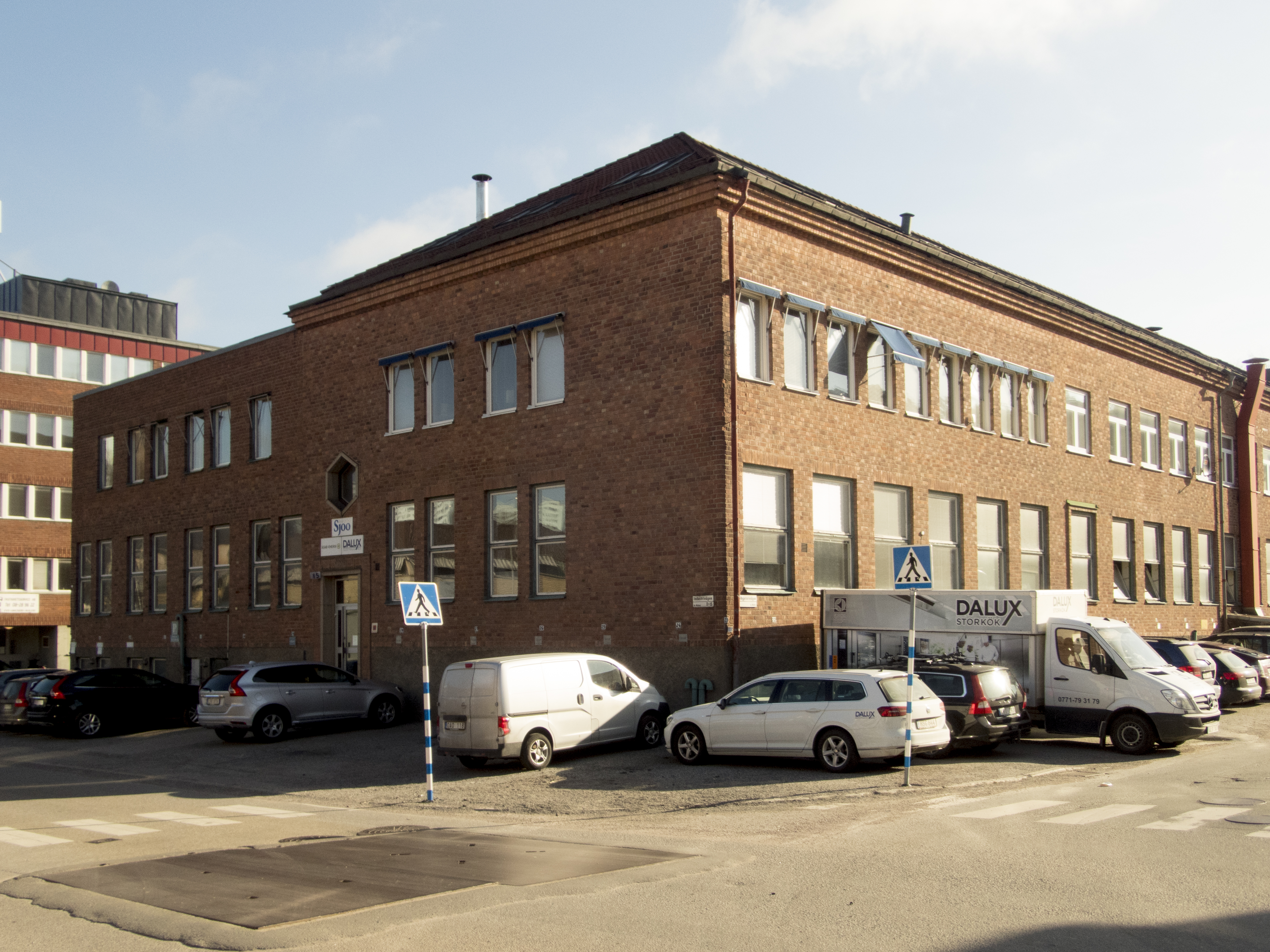 Mjölner 2, Gelbgjutarv 2 Solna Byggnadsår: 1948 Arkitekt: AB Husbyggnads co/ ark Ragnar af Malmborg. Konstrukt: Huskonstruktionsbyrån, Strokirk & Co. Civ-ing Gösta Lundin. Byggare: Byggnads AB Projector. Utför o ledn byggn-arb ing Wohlin. Byggherre: Sjöös Fabriks A/bol.